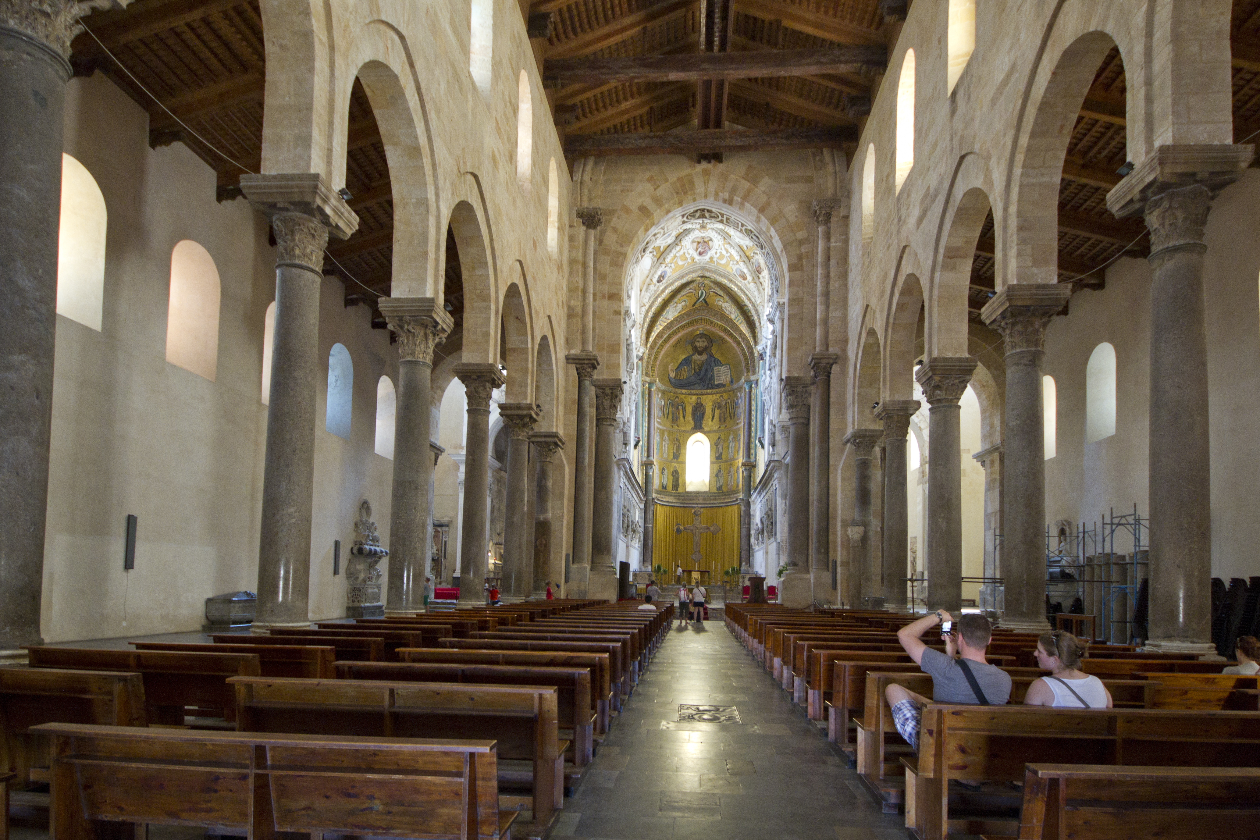 Cafalù Cathedral